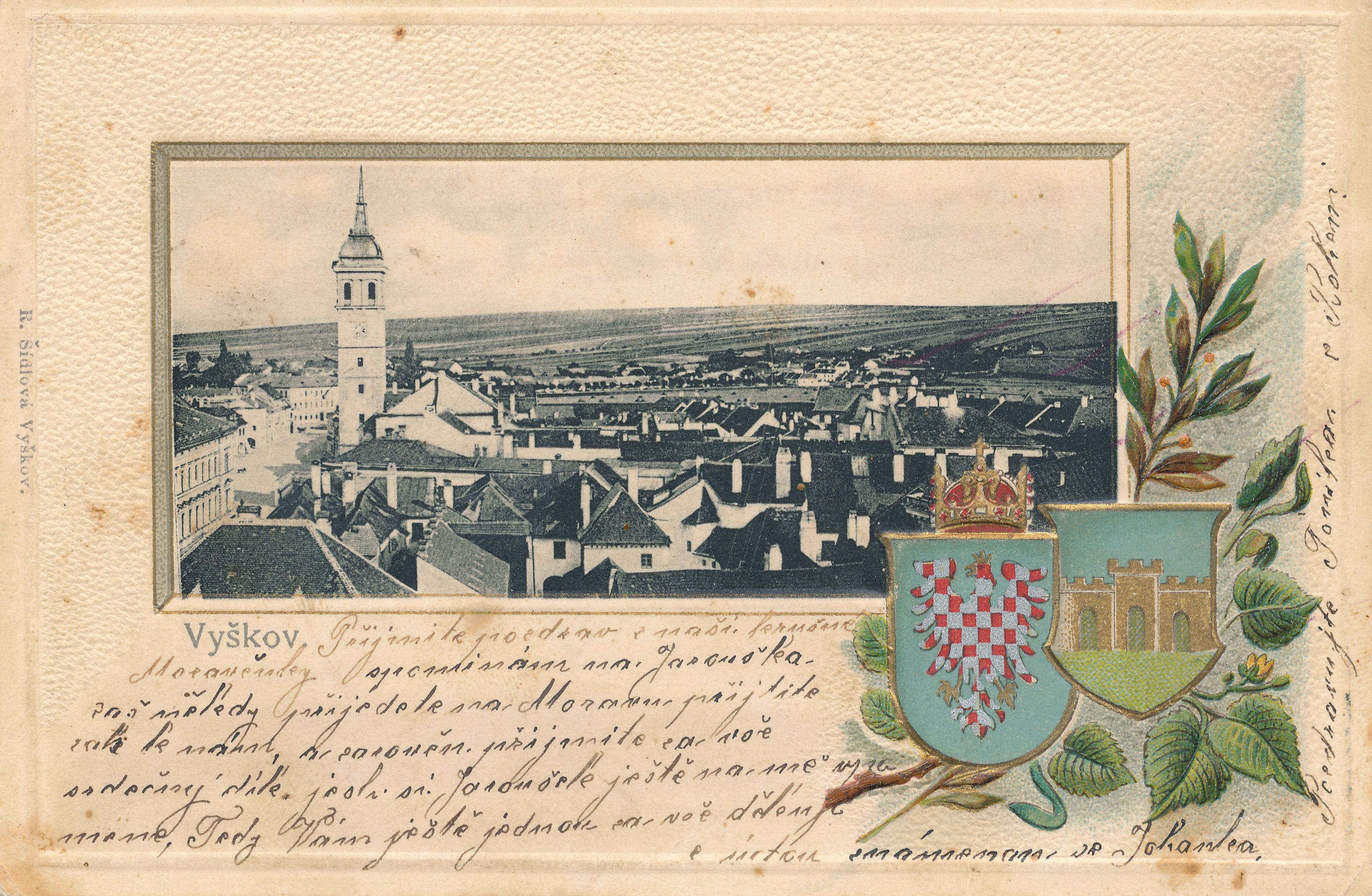 Plastická pohlednice. Kolorovaná. Vydaná kolem 1900 (do roku 1906). Znak Moravy. Znak Vyškova. Prošlá poštou. Přední strana pohlednice: Na levé straně: "R. Šídlová Vyškov. Pod panoramatem Vyškova (náměstí s radniční věží): Vyškov." Text psaní: "Přijmite pozdrav z naší krušné Moravěnky spominám na Jarouška zaš někdy přijedete na Moravu přijtite zas k nám, a zaroveň přijmite za vše srdečný dík, jesli si Jaroušek ještě na mě upomene, Tedy Vám ještě jednou za vše děkuji z úctou známenam se Johanka, Pozdravujte Toníka, z Bohem."